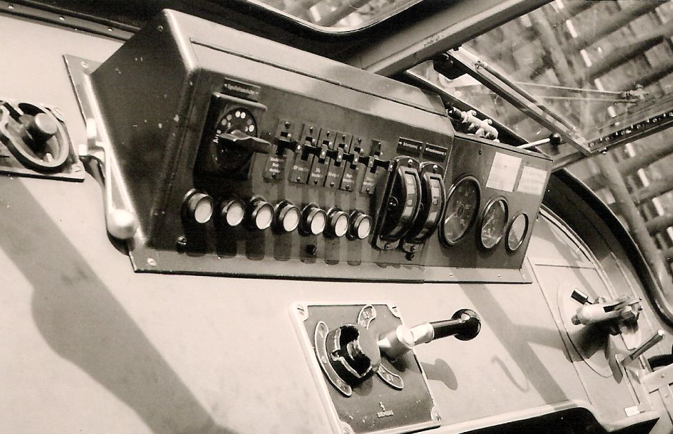 Fahrpult des S-Bahn-Triebzuges ET 170